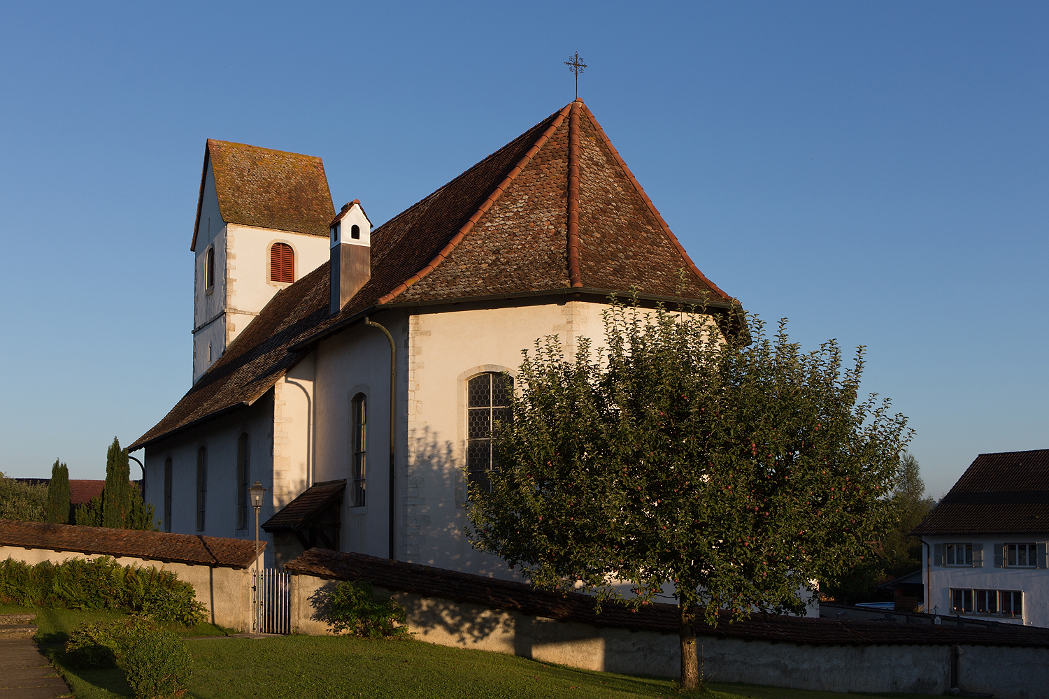 Kirche Notre-Dame de l'Immaculée Conception in Miécourt (Gemeinde La Baroche) - (JU)